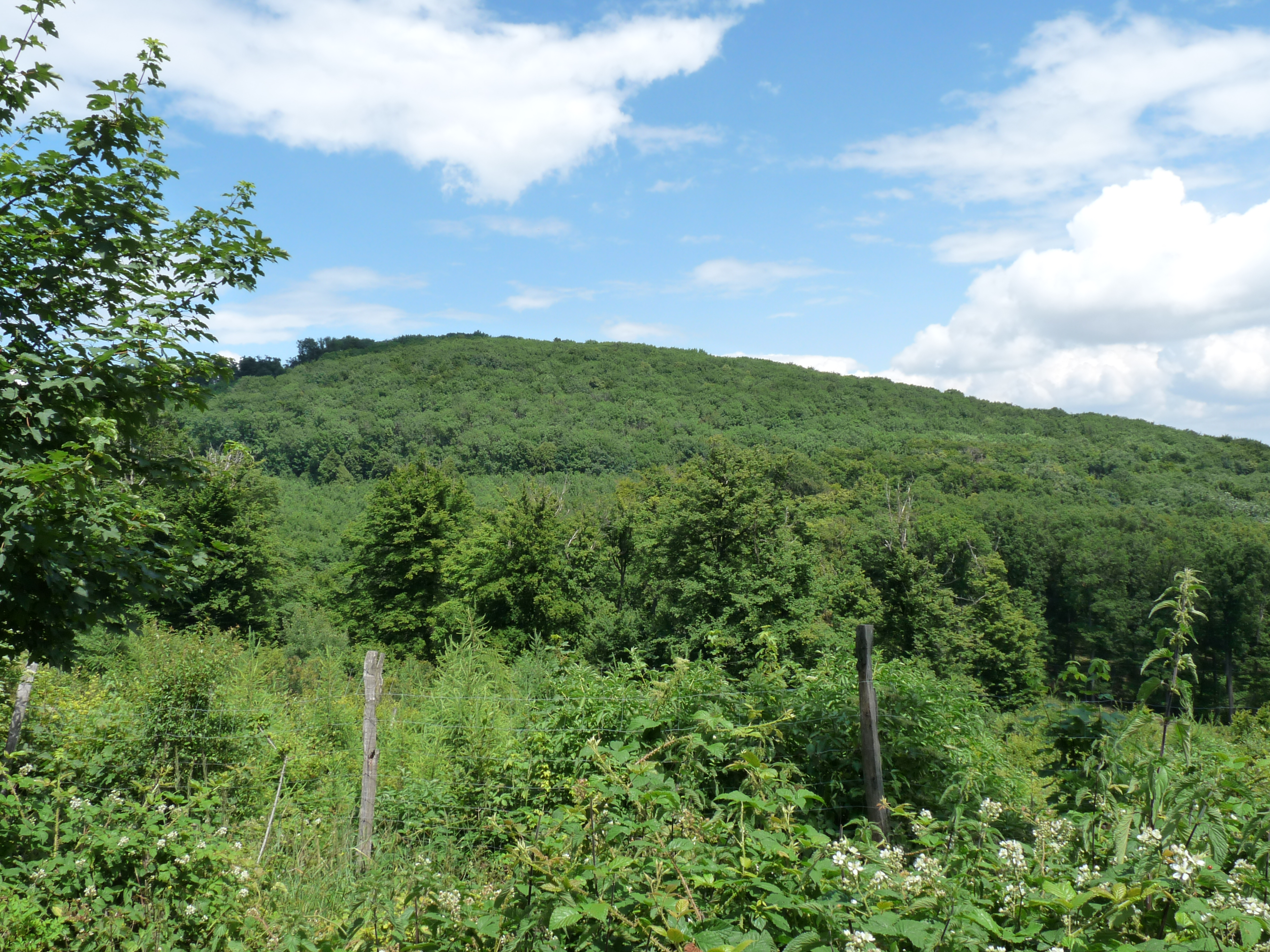 Južný svah Bolehlavu